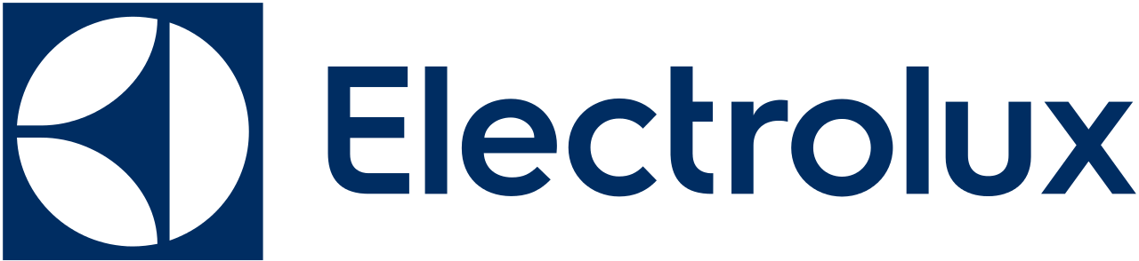 Логотип компании Electrolux